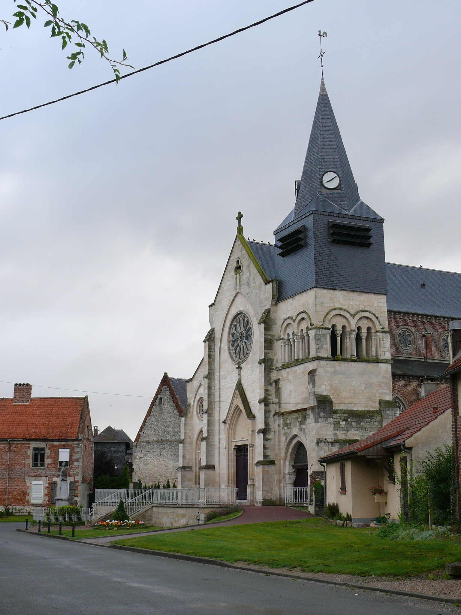 Croissy-sur-Celle : L'Église Saint-Léger